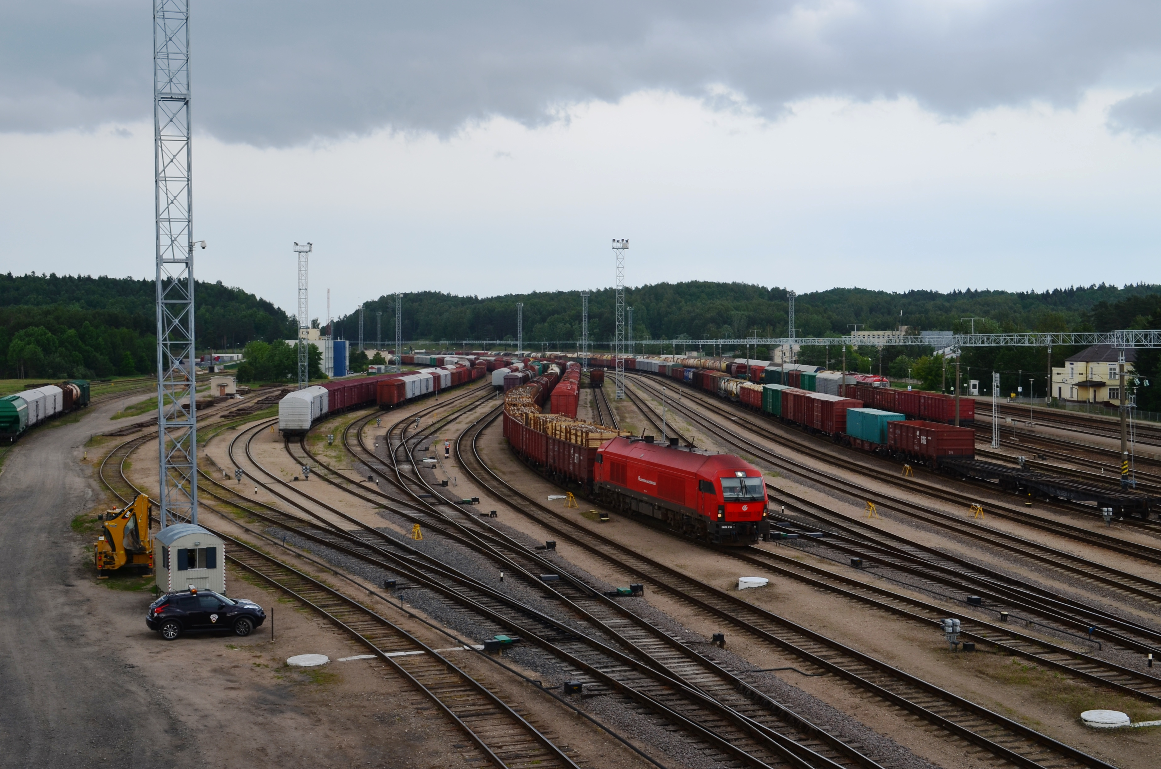 Panerių geležinkelių mazgas, Aukštieji Paneriai, Vilnius